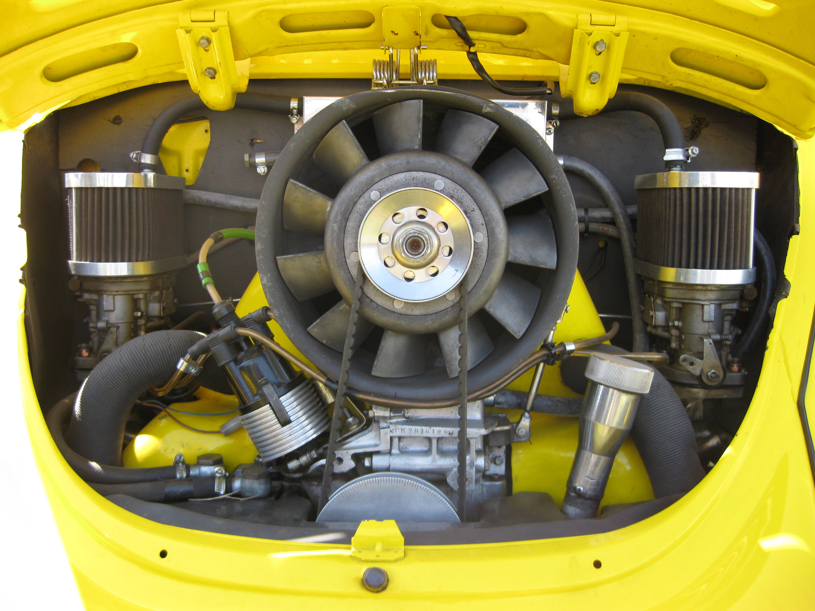 Motor des getunten Käfer